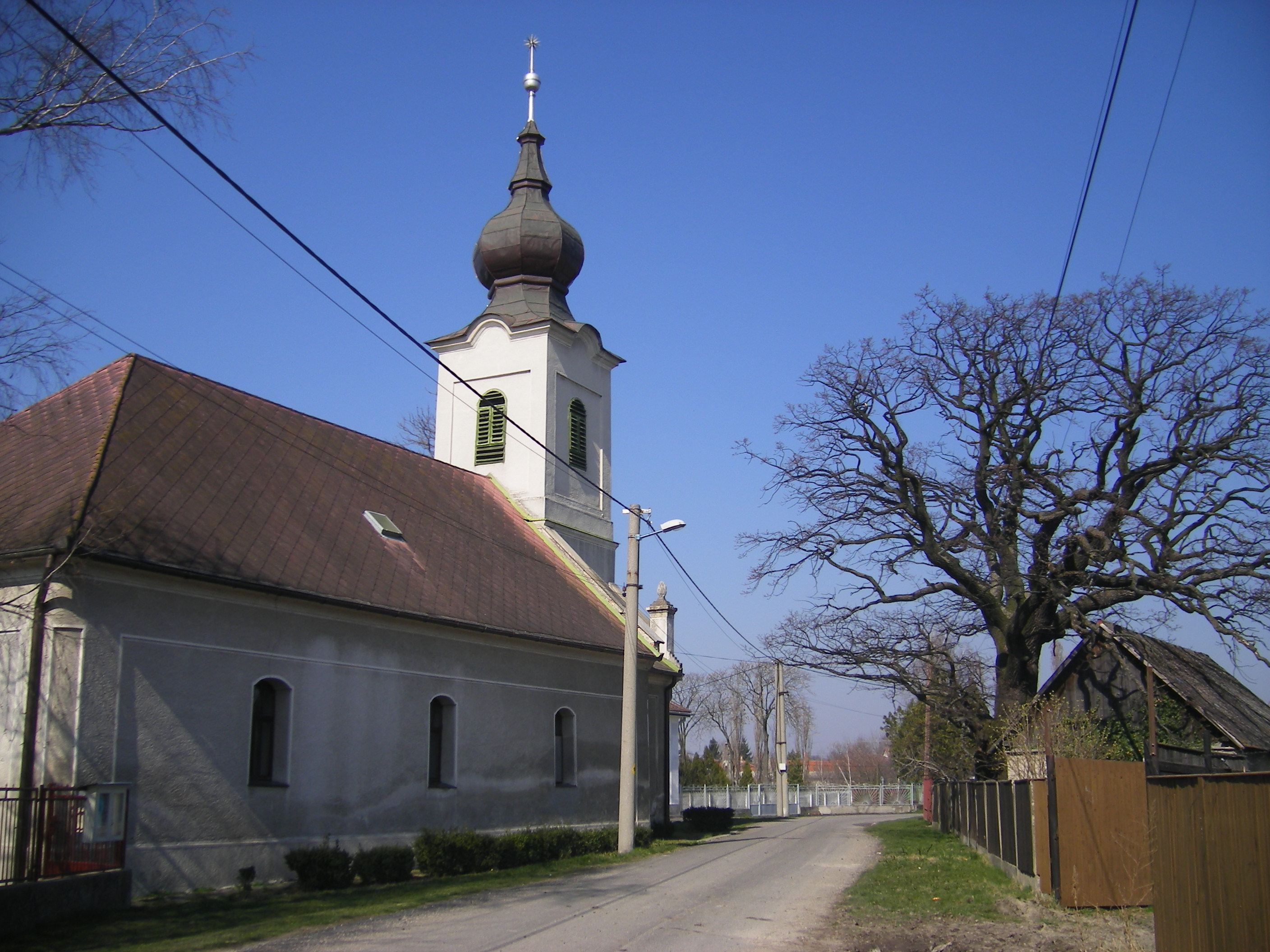 Csicsó, református templom